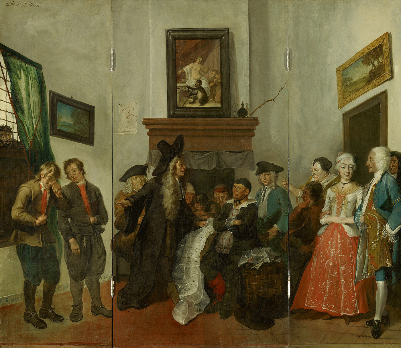 schilderij; Alewijn; genre; rechtspraak